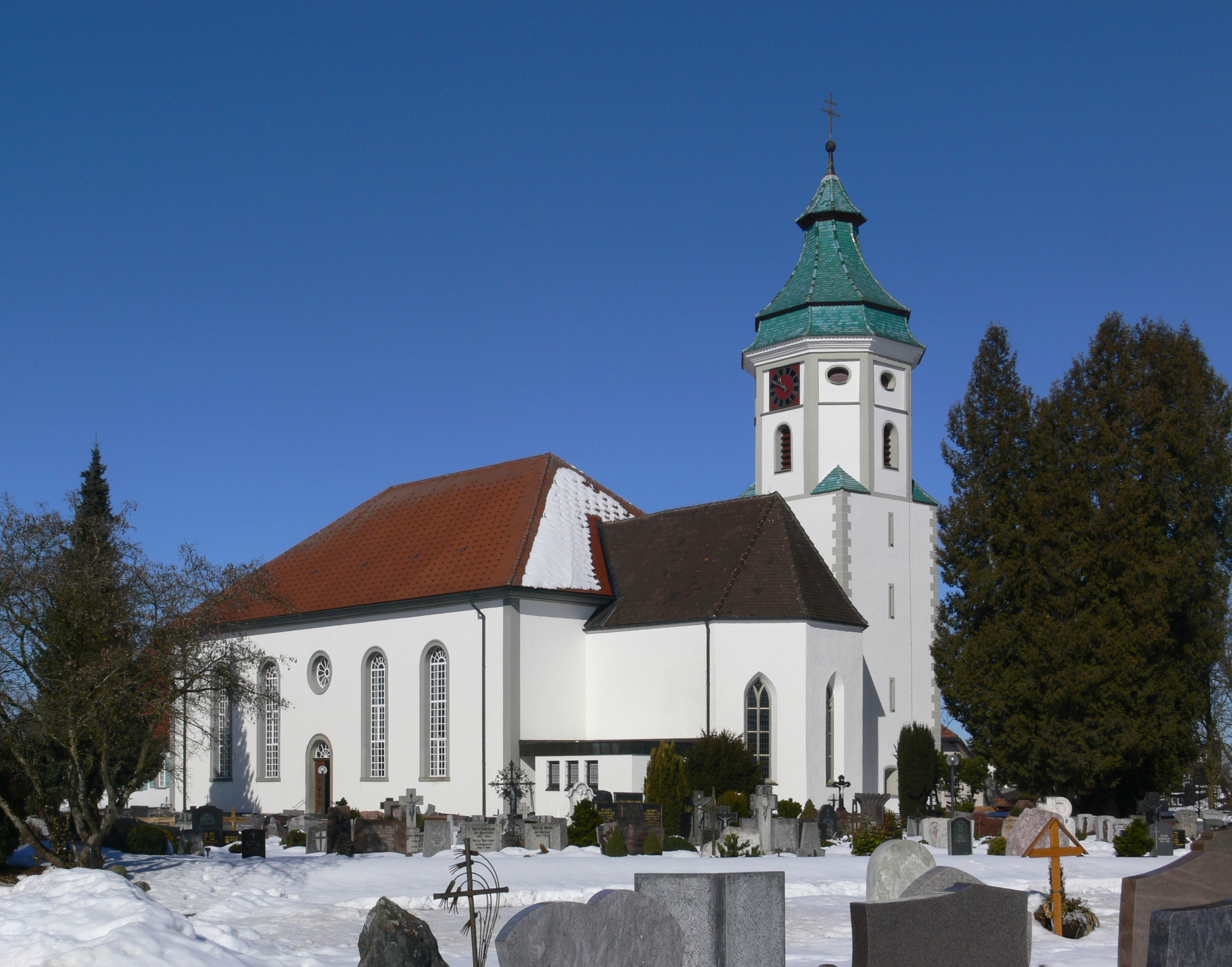 Pfarrkirche St. Gallus und Nikolaus, Grünkraut, Landkreis Ravensburg